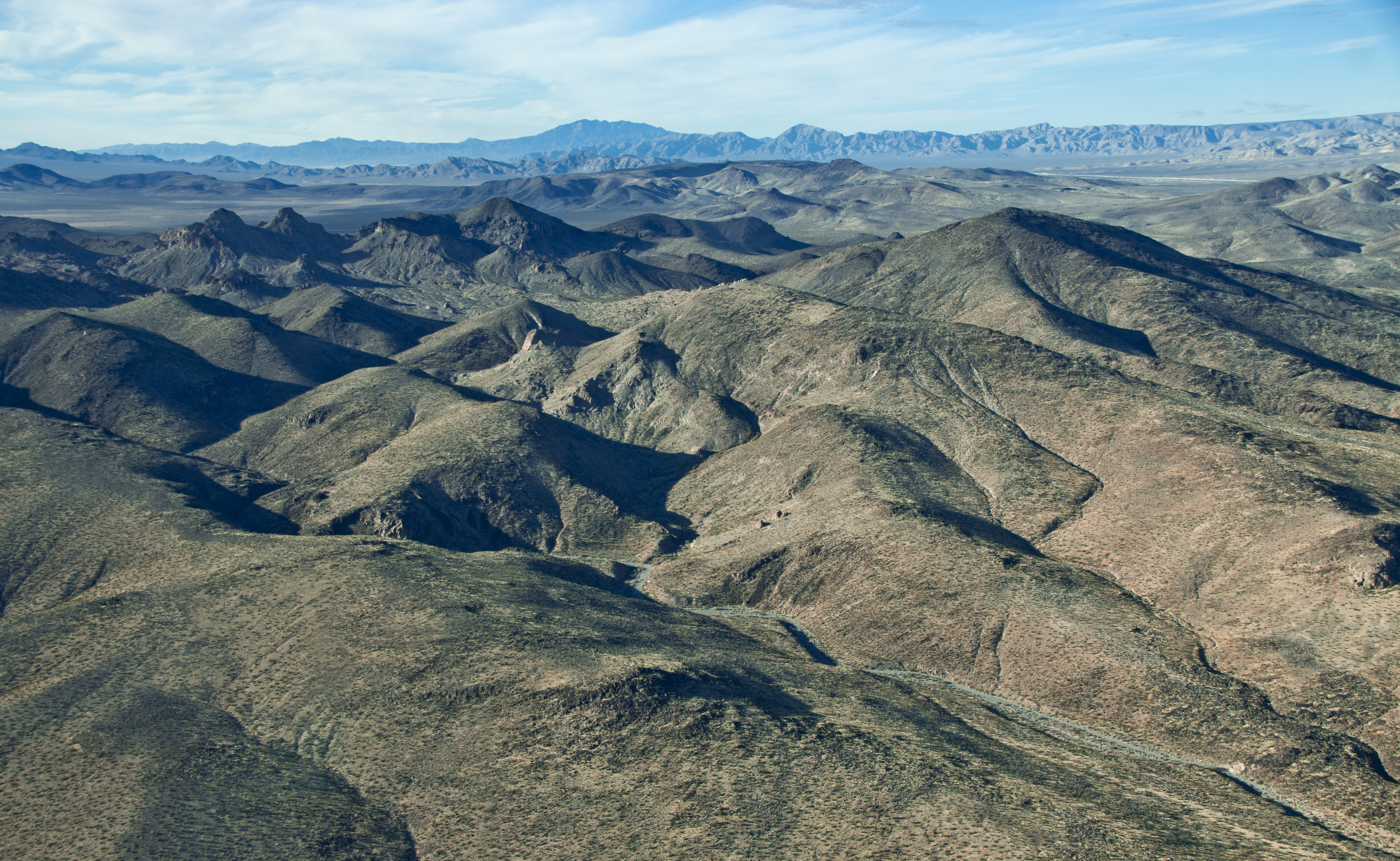 Las Vegas - Nevada - USA